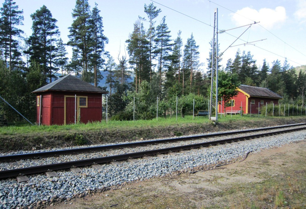 Austvoll stoppested på Bergensbanen